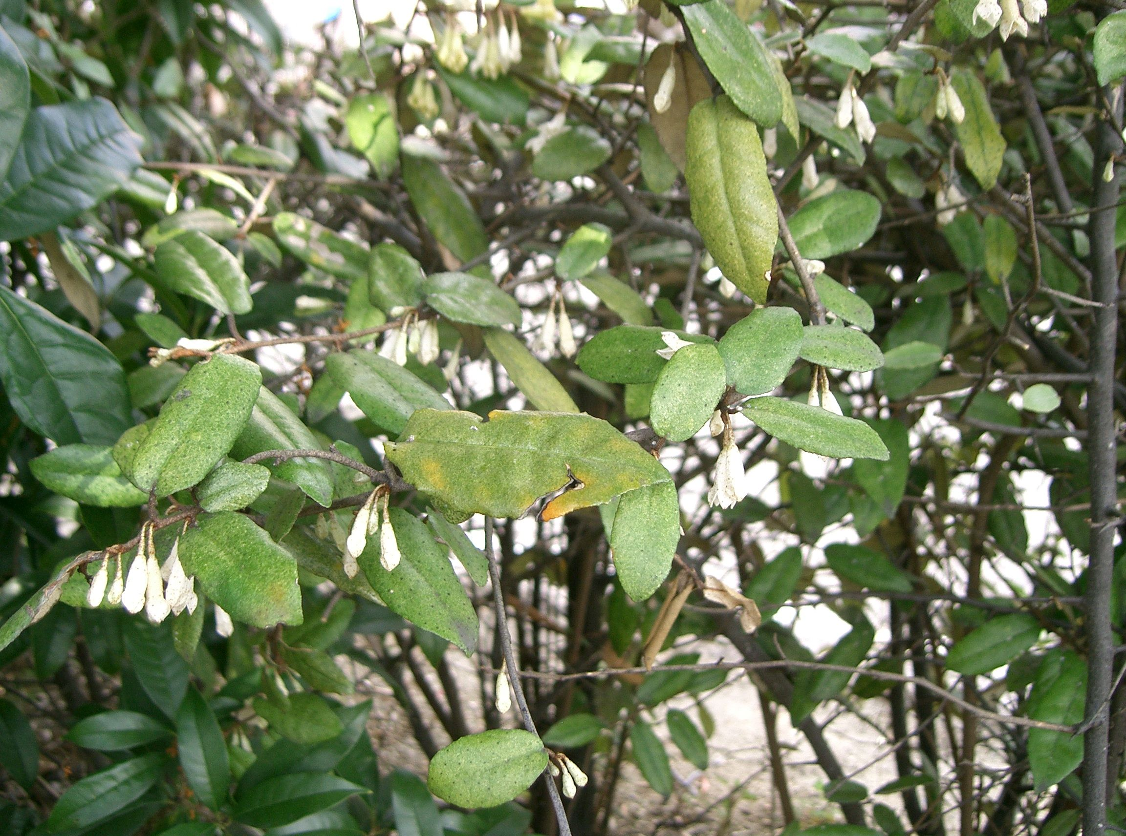 Elaeagnus pungens